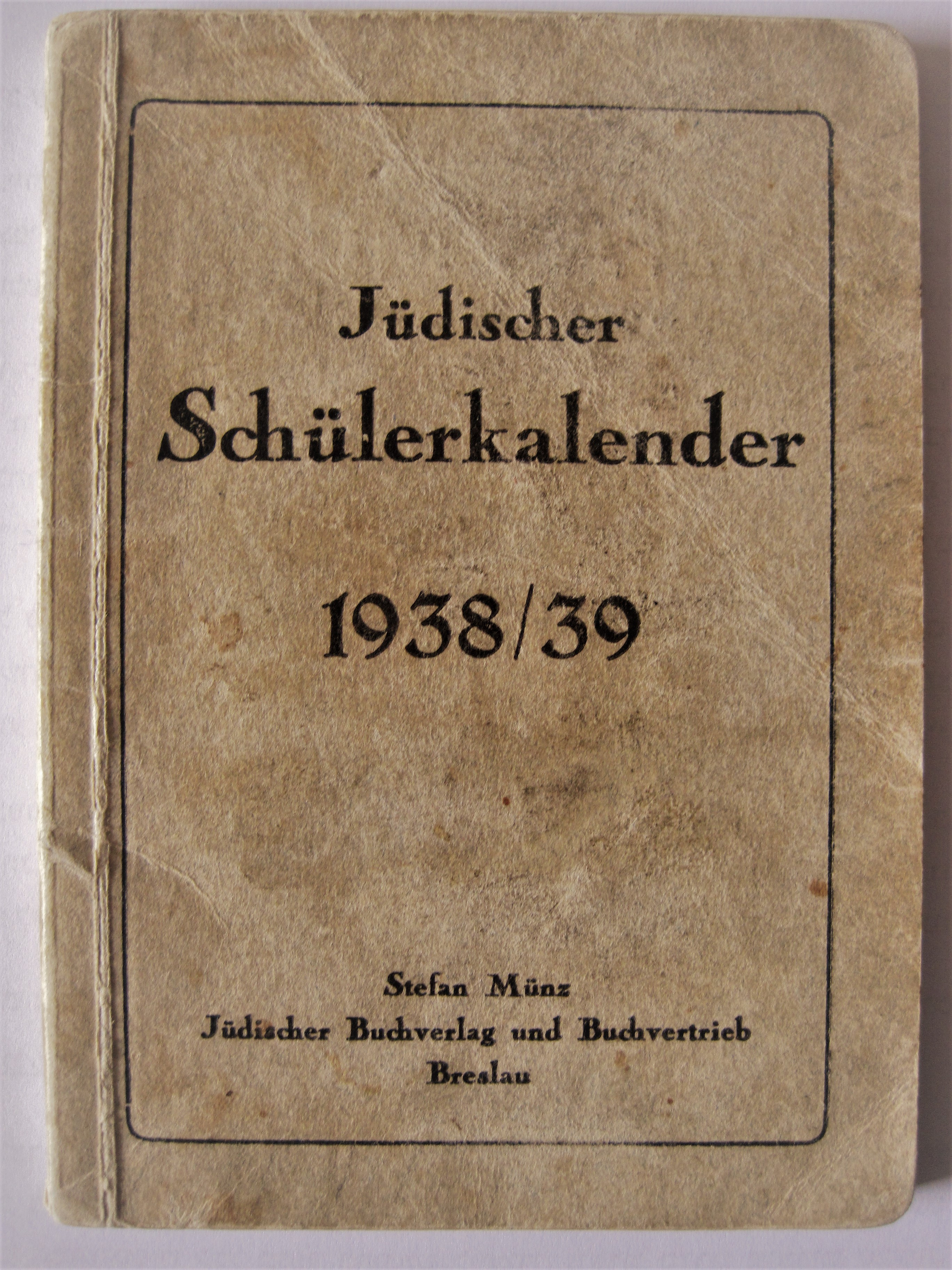 Log out of school for Jewish Breslau, 1938-1938